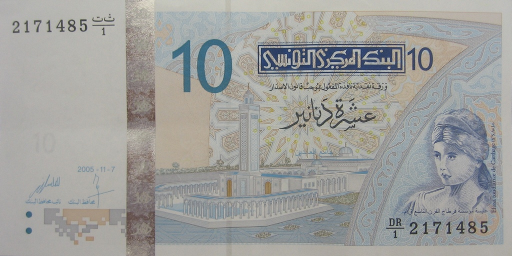 10 dinarów tunezyjskich - avers